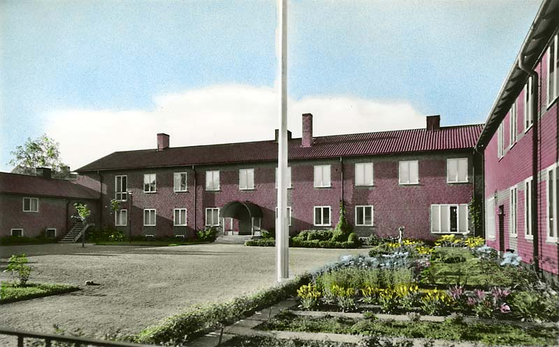 Hushållsseminariet.; Byggnadsverk; Skola; Utbildning och vetenskap